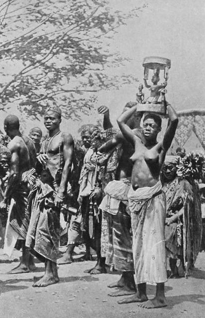 "Féticheurs et féticheuses à Abomey. Les populations Dahoméennes sont à peu près exclusivement fétichistes"